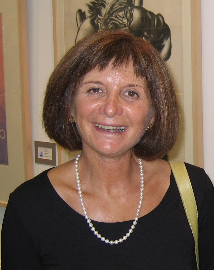 Алисия Хименес-Бартлетт в выставочном зале Института Сервантеса в Москве